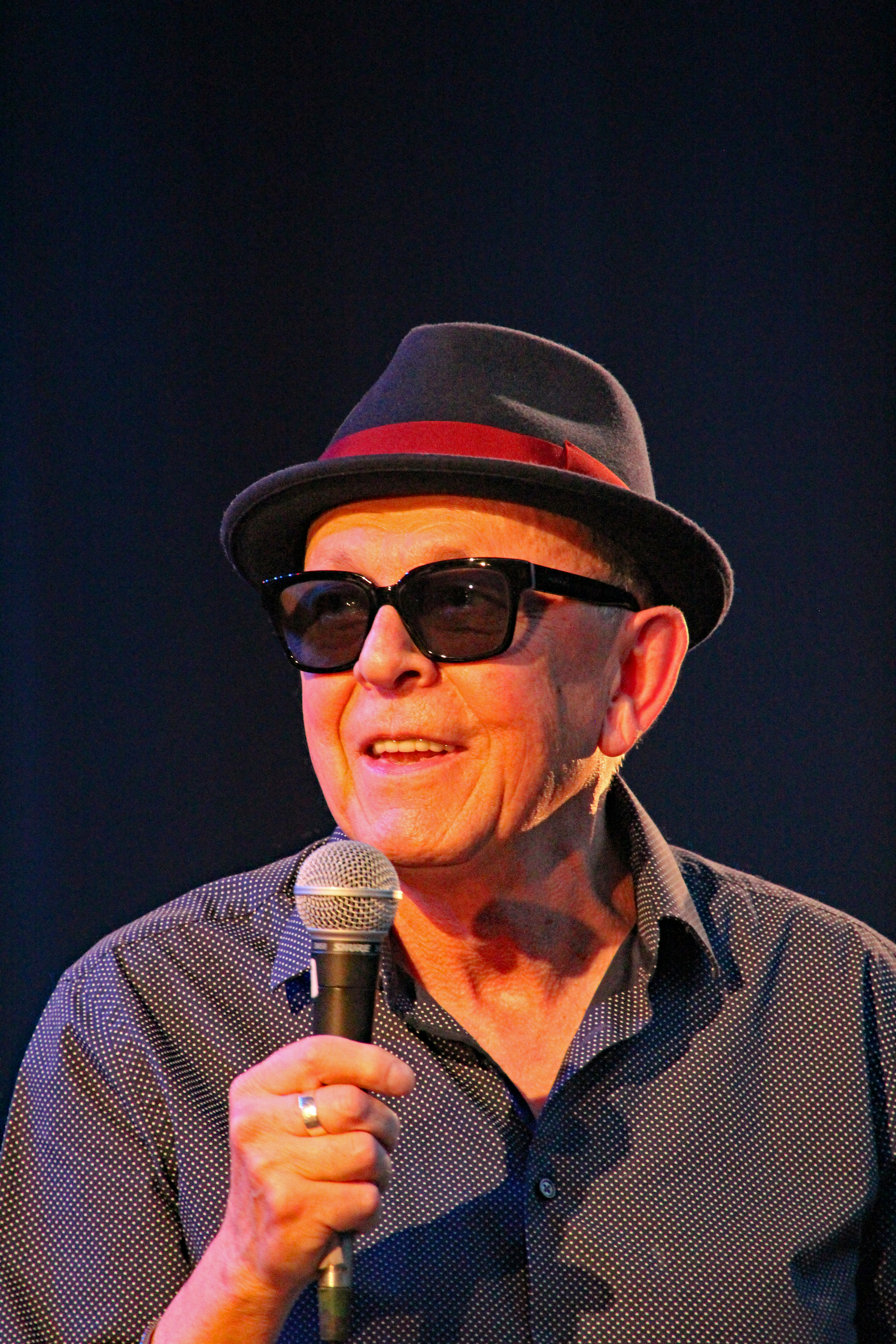 Bildinhalt: Janusz Stefański bei einem Auftritt der Krakau-Frankfurt-Jazz-Unit im Frankfurter Palmengarten Aufnahmeort: Frankfurt am Main, Deutschland Die dargestellte Person ist eine Person bei einem öffentlichen Auftritt.